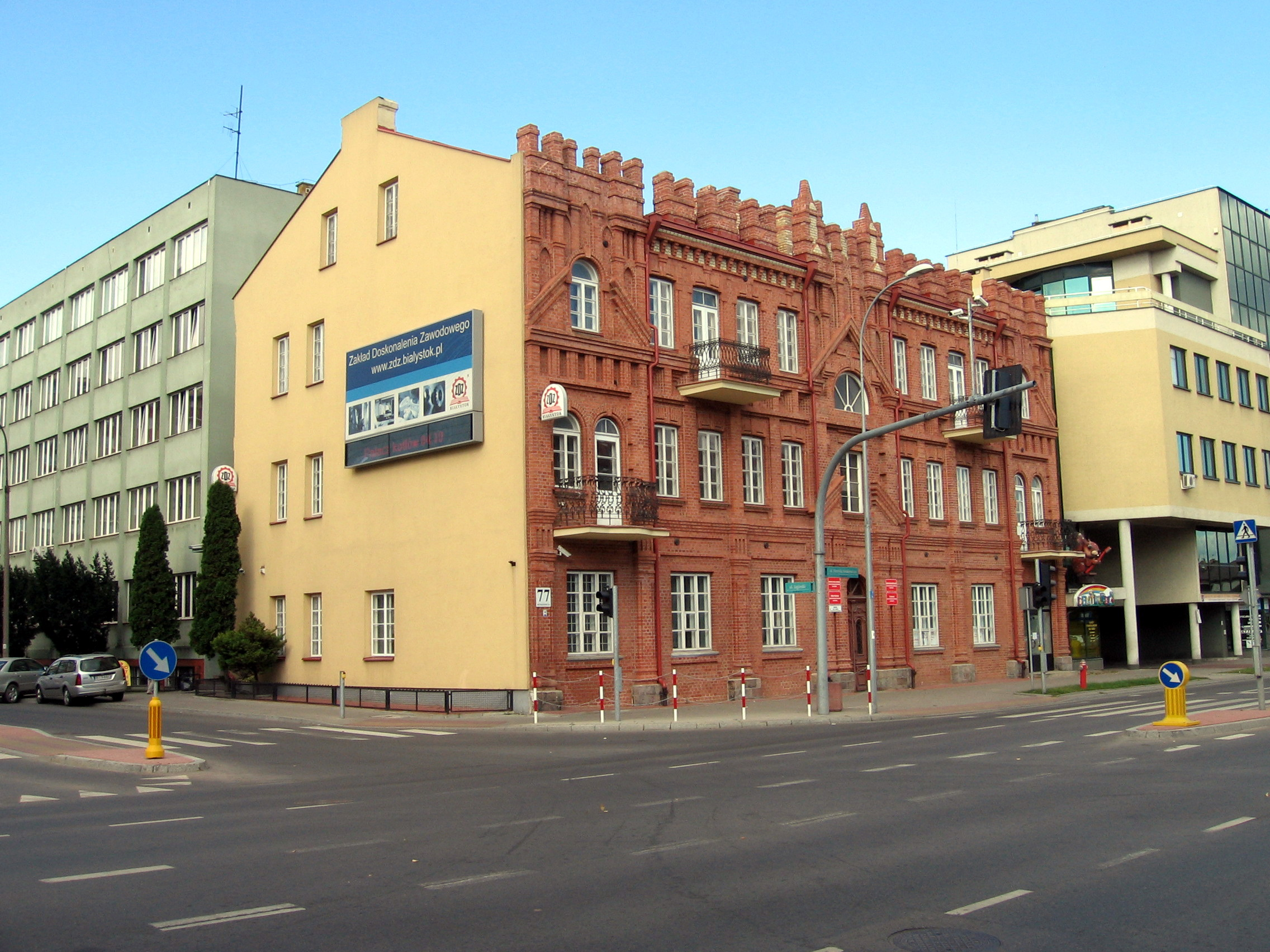 Białystok, ul. Sienkiewicza 77 - kamienica, obecnie siedziba Ośrodka Kształcenia Zawodowego ZDZ (zabytek nr A-224 z 4.05.1982)